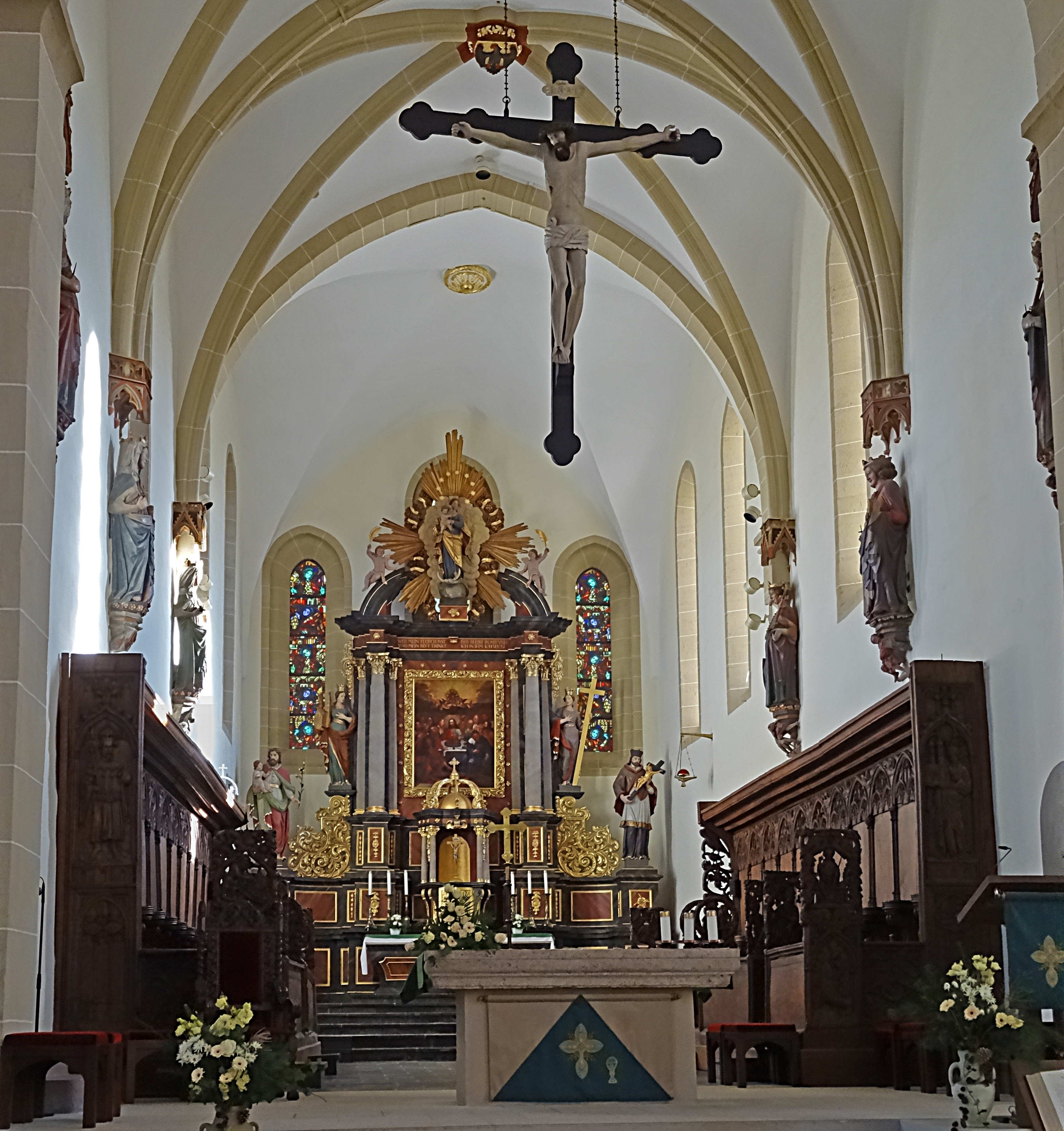 Blick in den Chorraum zum Hochaltar des Nordhäuser Doms